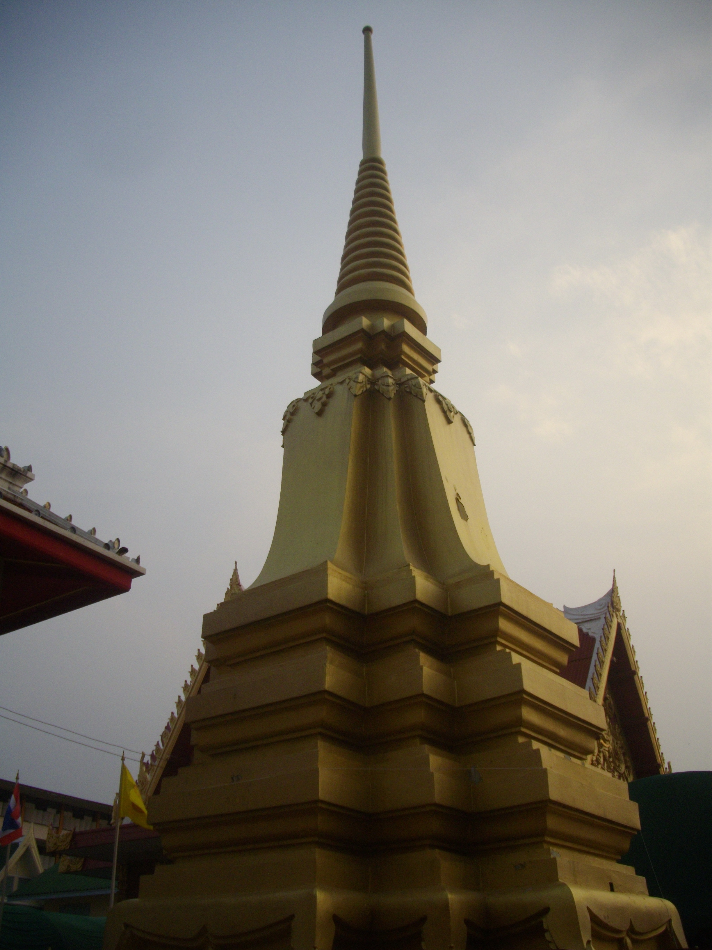 พระสถูปบรรจุพระบรมอัฐิของสมเด็จพระอัครมเหสี กรมหลวงบาทบริจา พระอัครมเหสีในสมเด็จพระเจ้าตากสินมหาราช ณ วัดอินทาราม (วัดบางยี่เรือนอก หรือวัดบางยี่เรือใต้) แขวงบางยี่เรือ เขตเทอดไทย กรุงเทพมหานคร